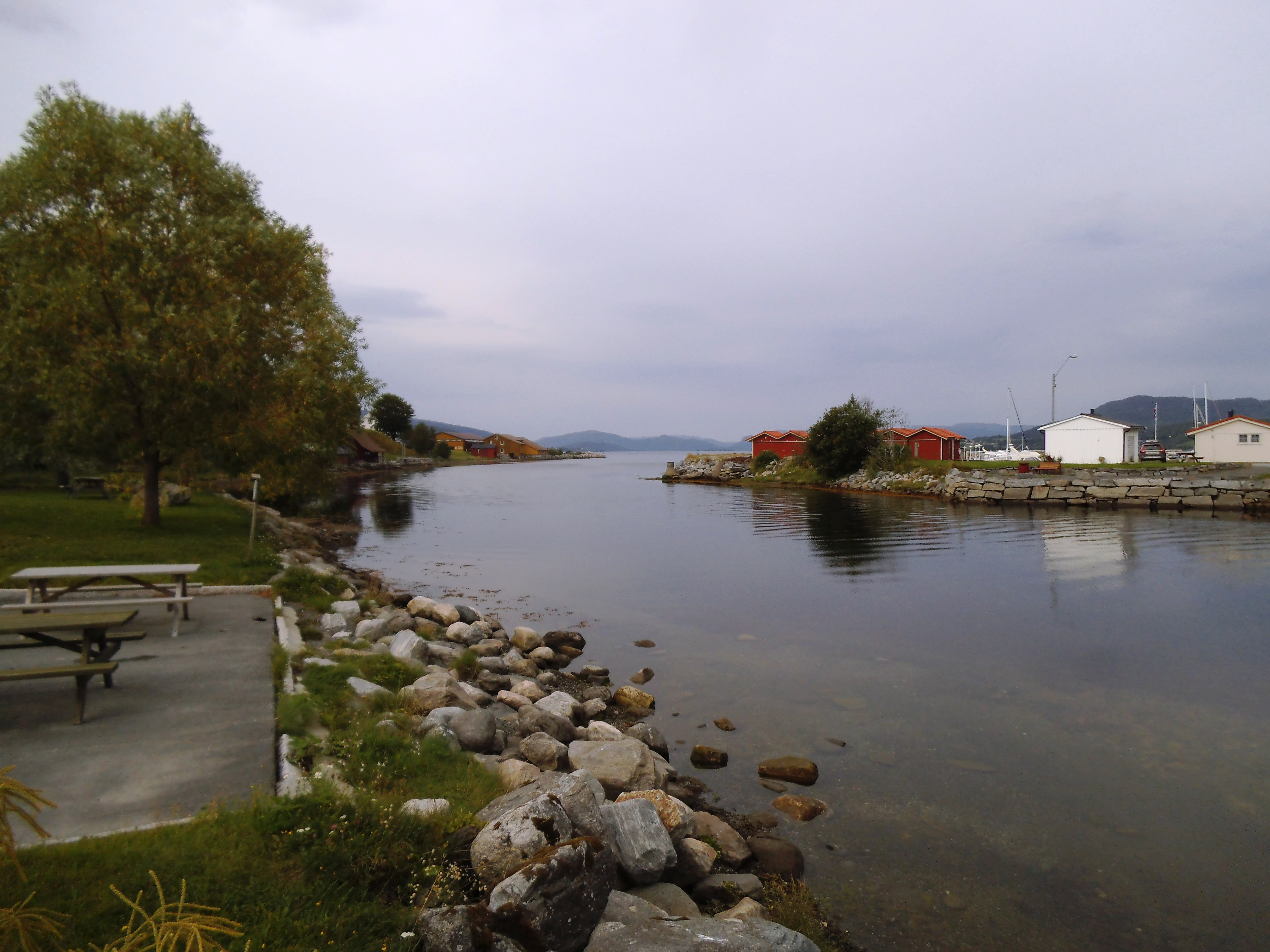 Kyrksæterøra sentrum.